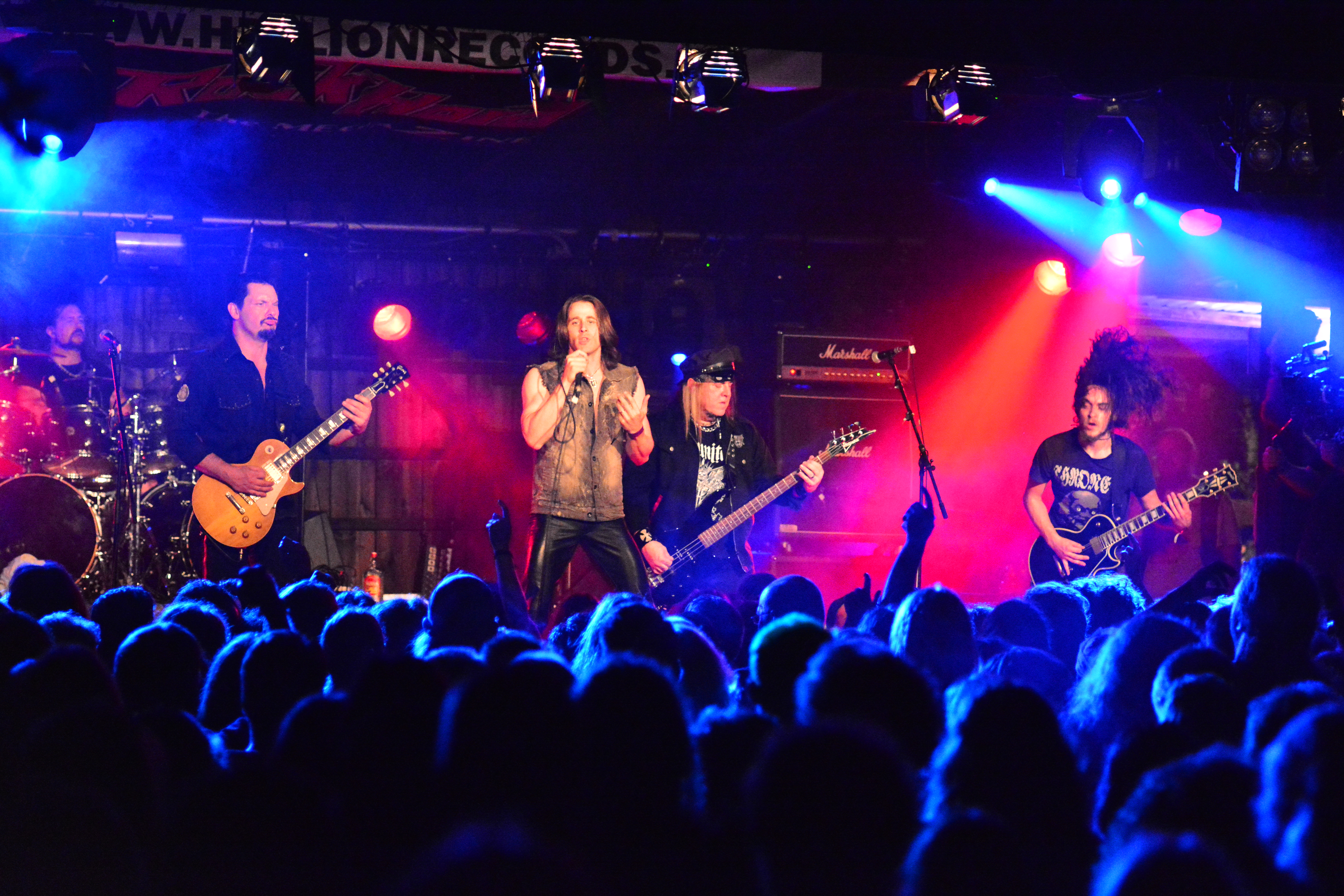 Riot V beim Headbangers Open Air 2014